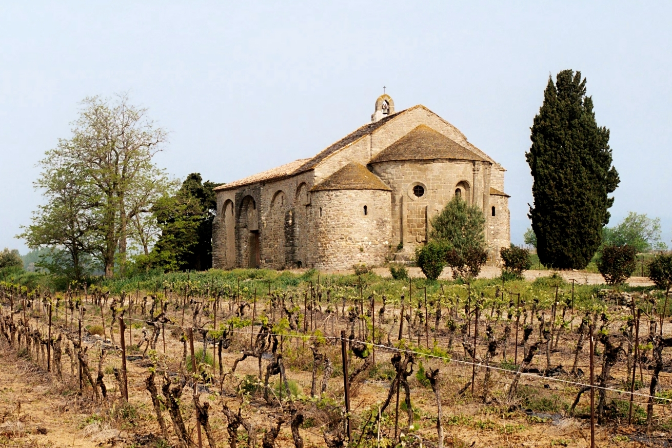 France - Languedoc - Aude - Azille - Chapelle Saint-Étienne de Vaissière